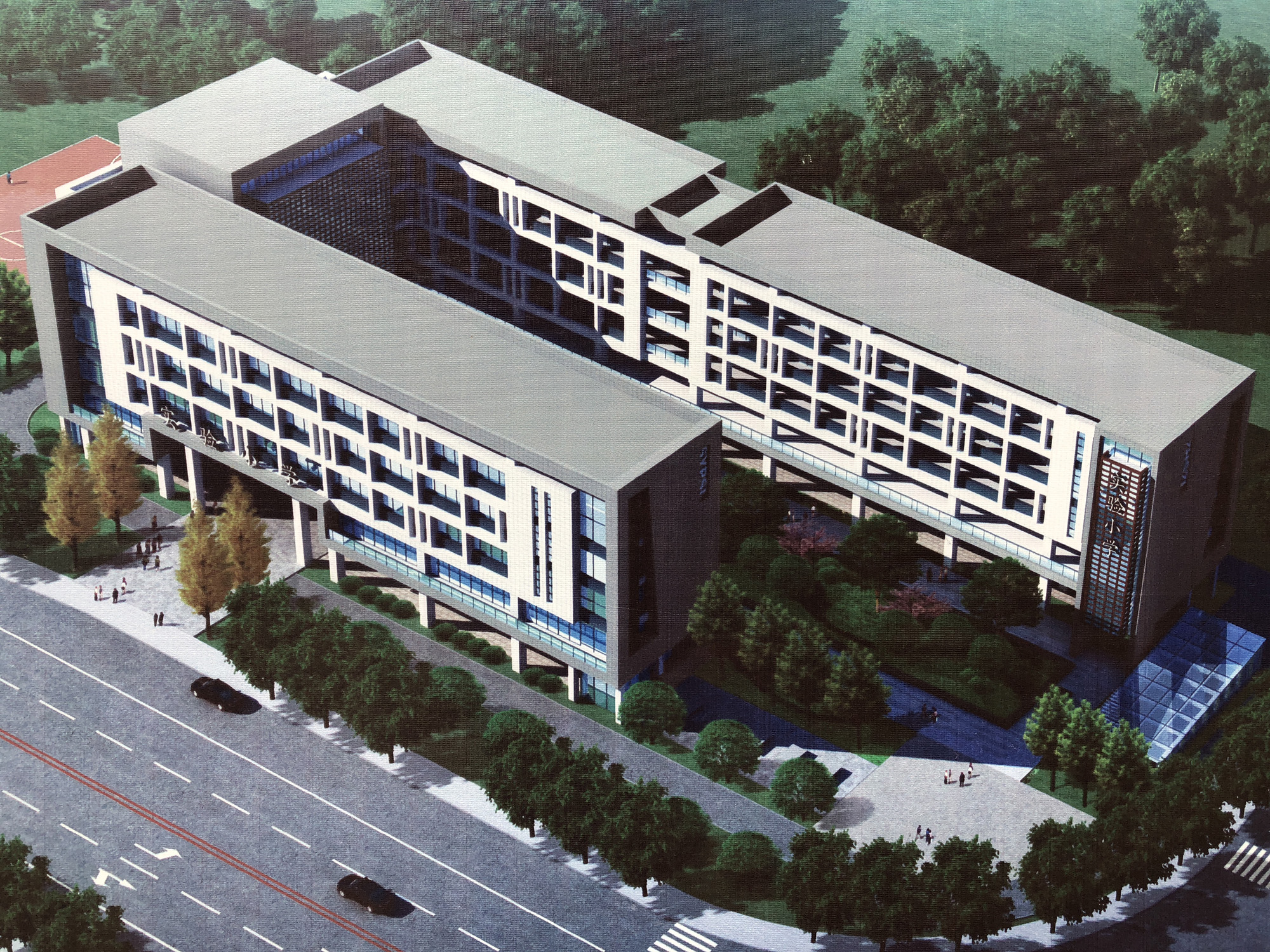 长沙市实验小学扩建工程（2018年）